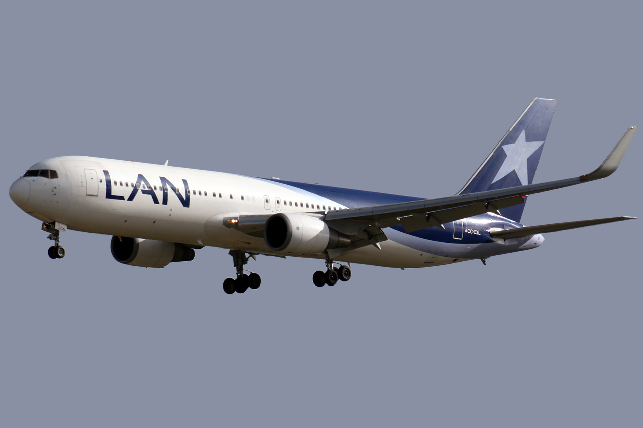 Madrid - Barajas (LEMD/MAD)